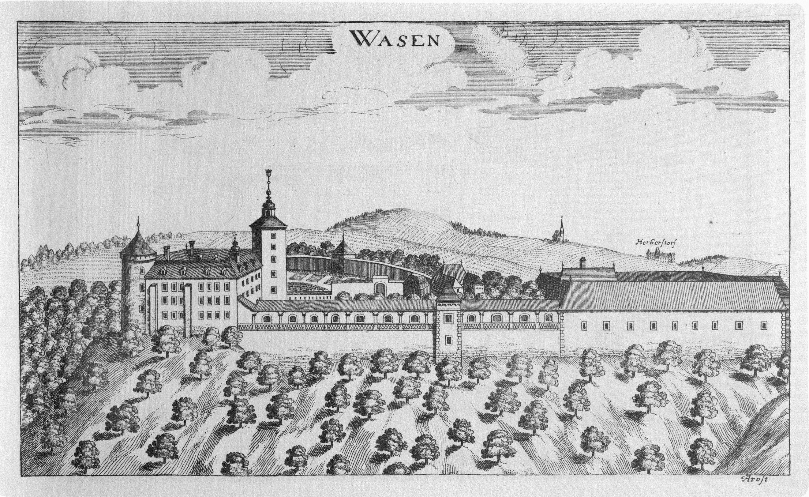 G. M. Vischers Käyserlichen Geographi, Topographia Ducatus Stiriae, Das ist: Eigentliche Delineation / und Abbildung aller Städte / Schlösser / Marcktfleck / Lustgärten / Probsteyen / Stiffter / Clöster und Kirchen / so es sich im Herzogthumb Steyrmarck befinden; Und anjetzo Umb einen billichen Preyß zu finden seynd Bey Johann Bitsch Universitäts Buchhandlern / Auff dem Juden=Platz bey der guldenen Saulen. Graz 1681 Die Nummerierung der Dateien folgt der alphabetischen Reihung der Ortsnamen und entspricht nicht dem Vischer-Register